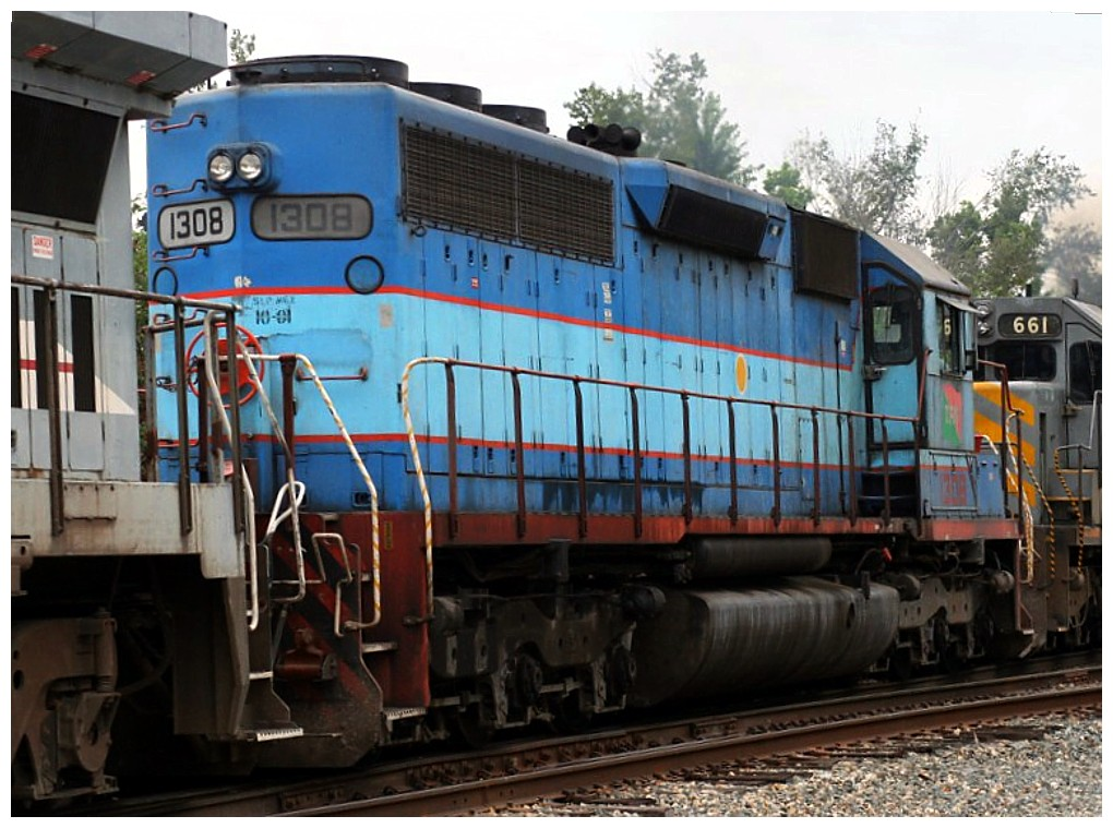 Transportación Ferroviaria Mexicana 1308, EMD SD40